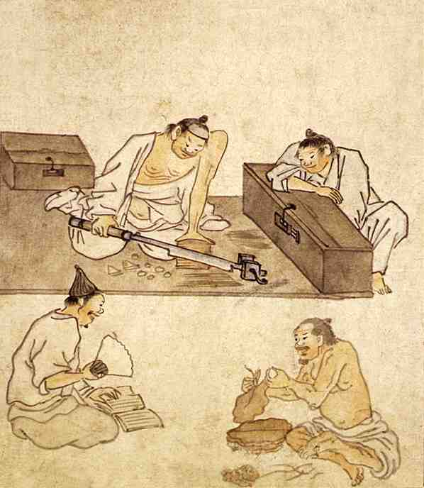 담배썰기, 단원풍속도첩(檀園風俗畵帖)에서 종이에담채, 27cm x 22.7cm, 국립 중앙박물관 소장